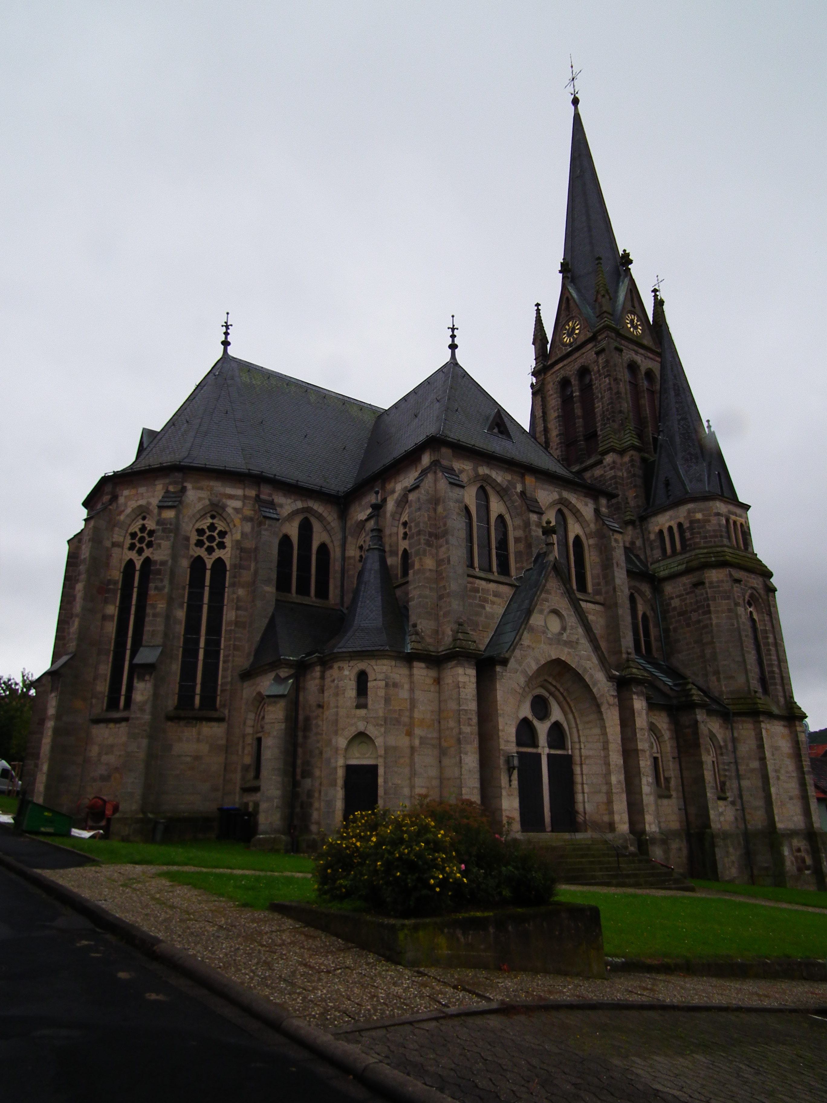 Evangelische Stadtkirche in Tann (Rhön, Hessen, Deutschland)